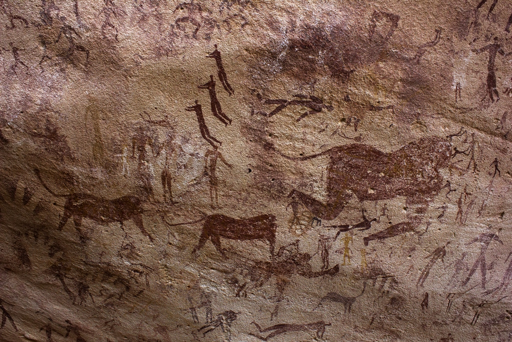 Seres humanos bailando, flotando y nadando alrededor de unas bestias.